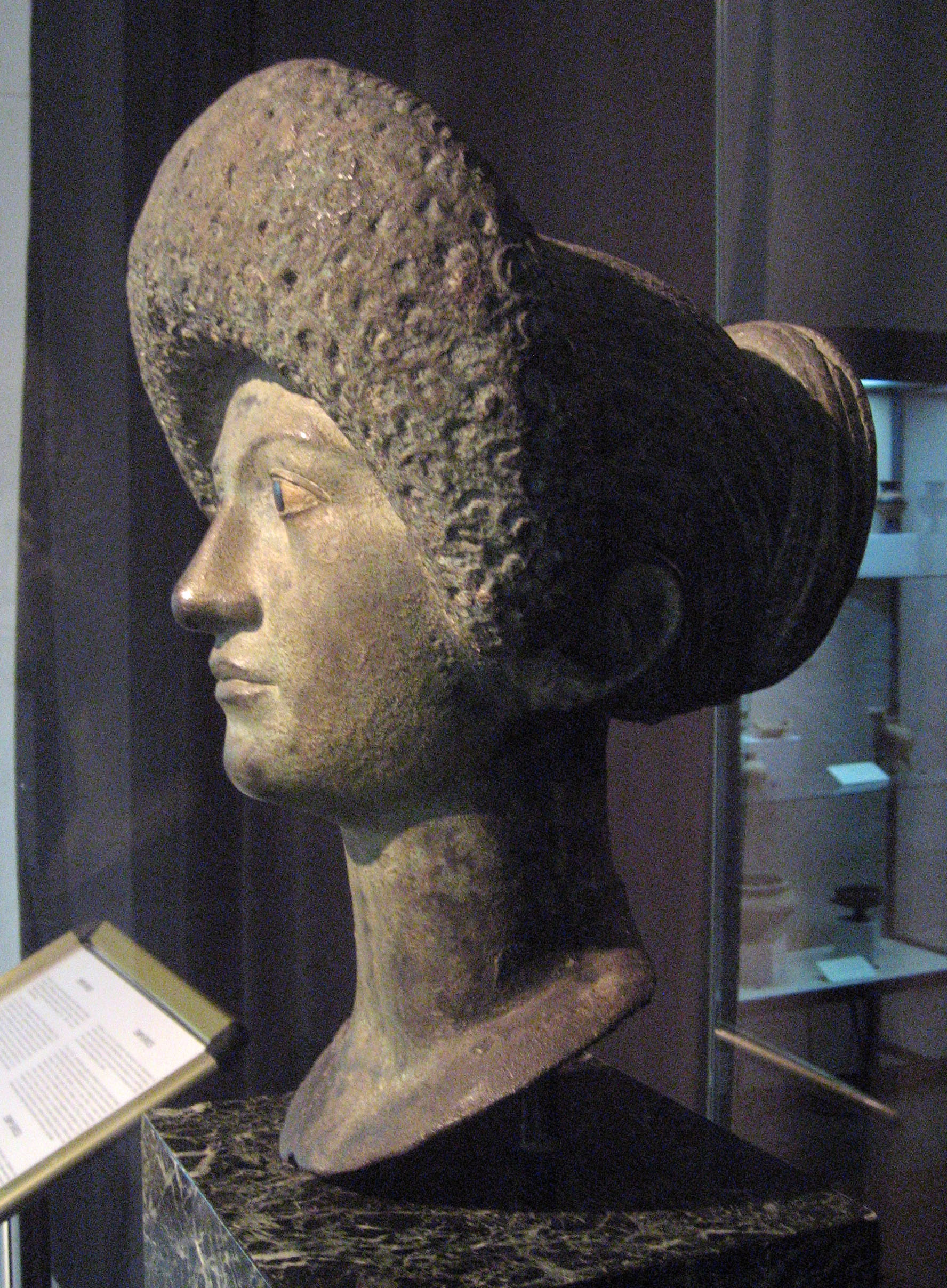 Dama Flàvia 69-96 dC descubierta en 1892 en Empúries, consrvada en el Museu d'Arqueologia de Catalunya en Barcelona (Spain)